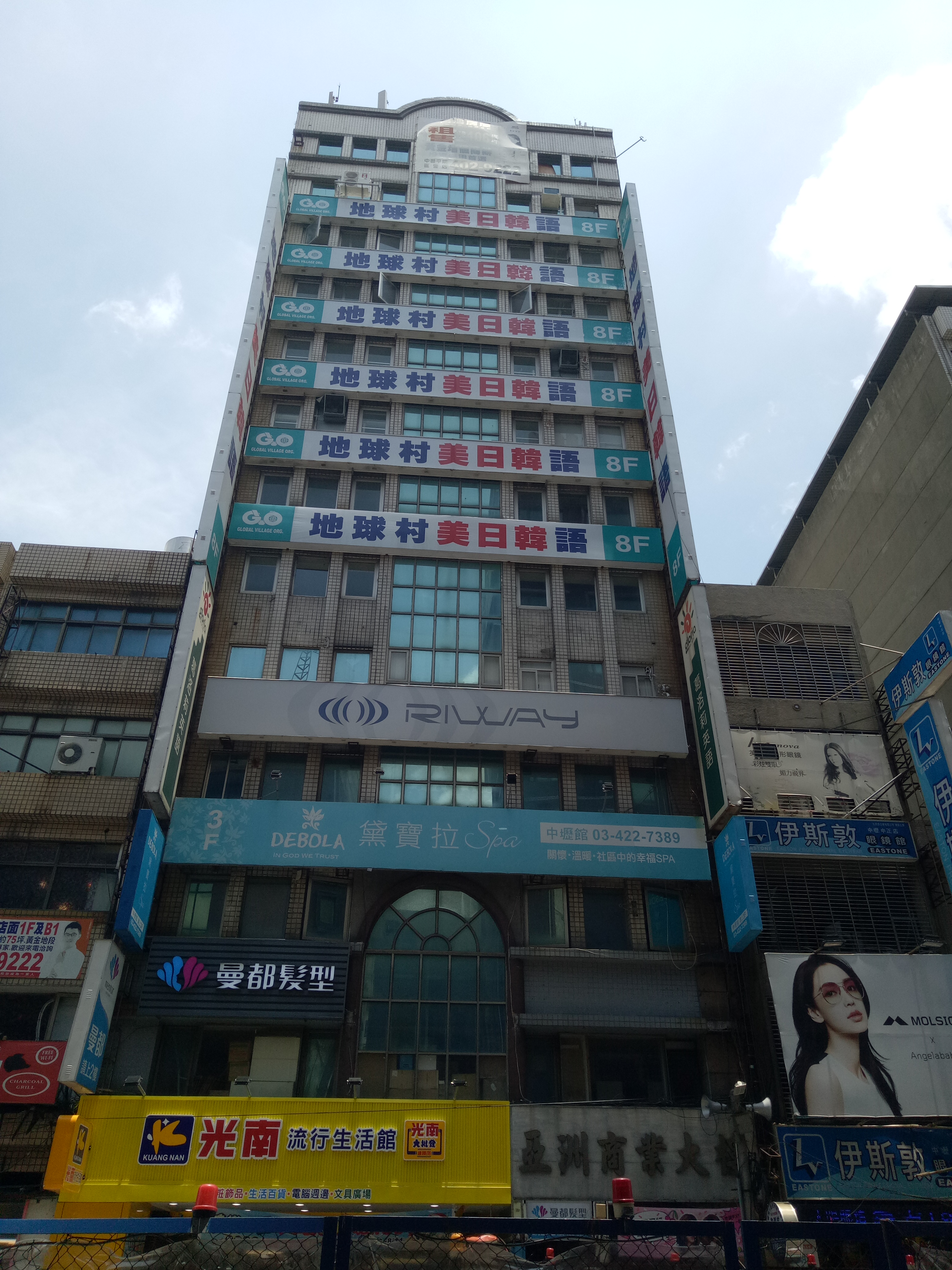 地球村美日韓語中壢分校所在的亞洲商業大樓。